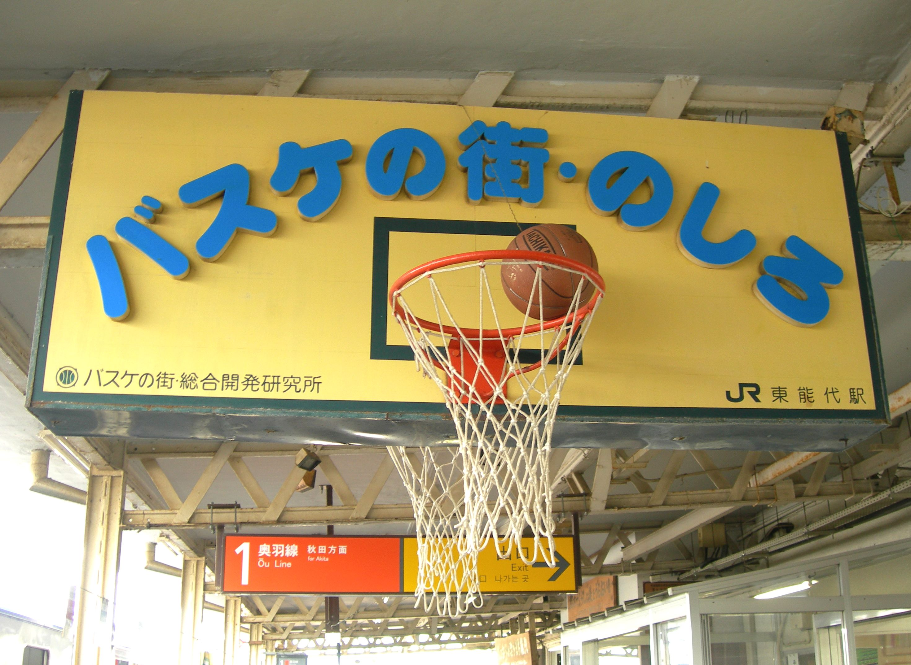 東能代駅ホームにあるバスケットゴール